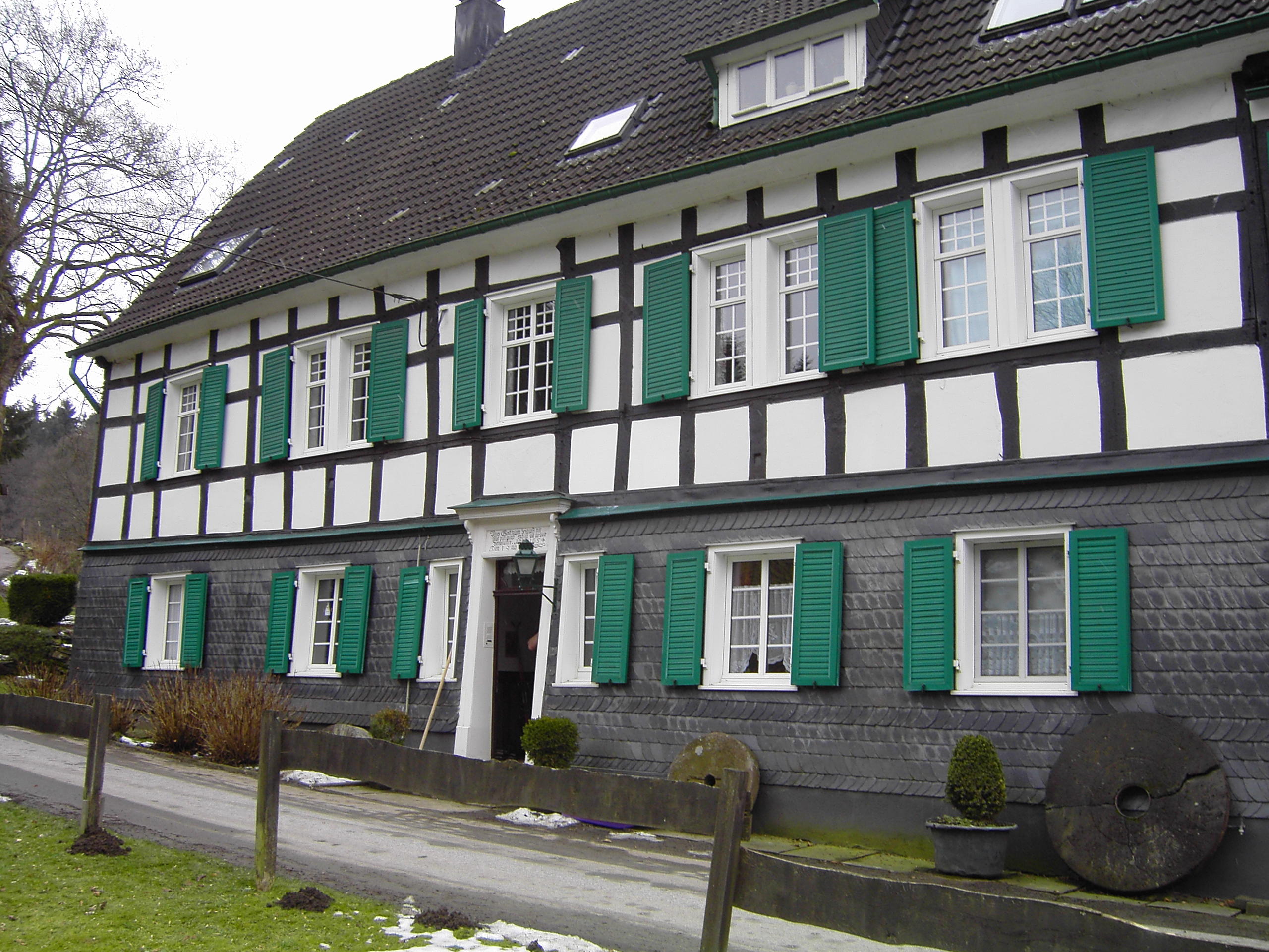 Bergermühle in Wermelskirchen